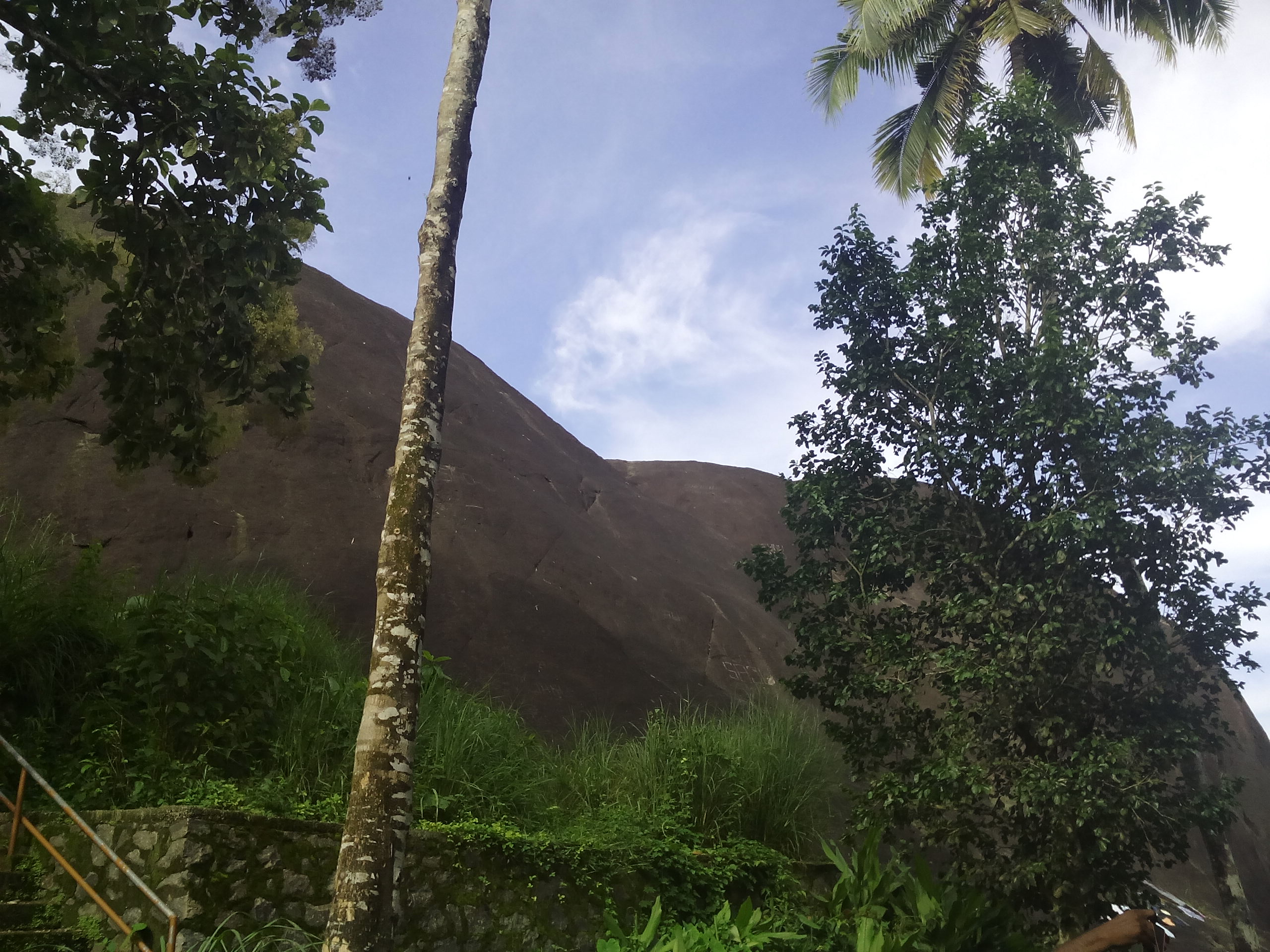 കവിയൂർ ഗുഹാ ക്ഷേത്രം പാറക്കെട്ട്